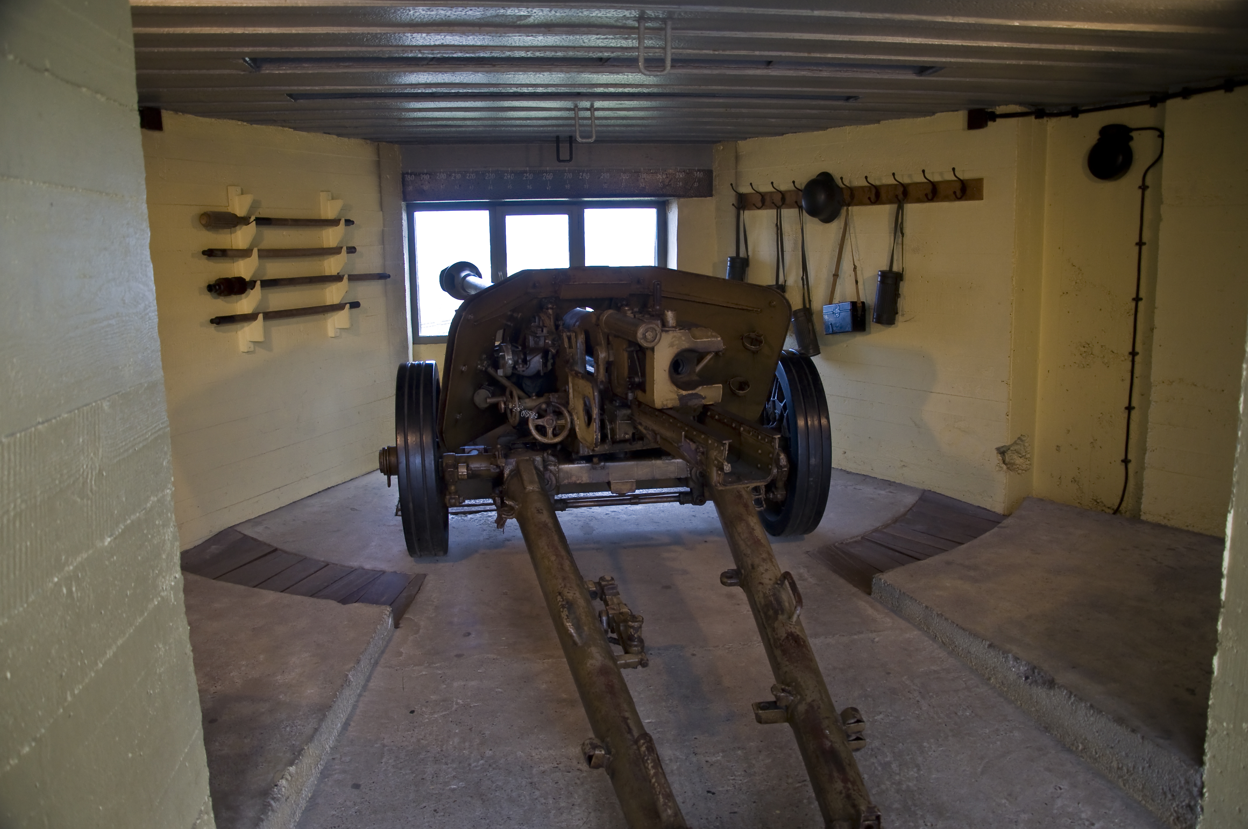 Een Pak 40 (Panzer Abwehr Kanon) - in het Openluchtmuseum Atlantikwall te Raversijde, Oostende, België